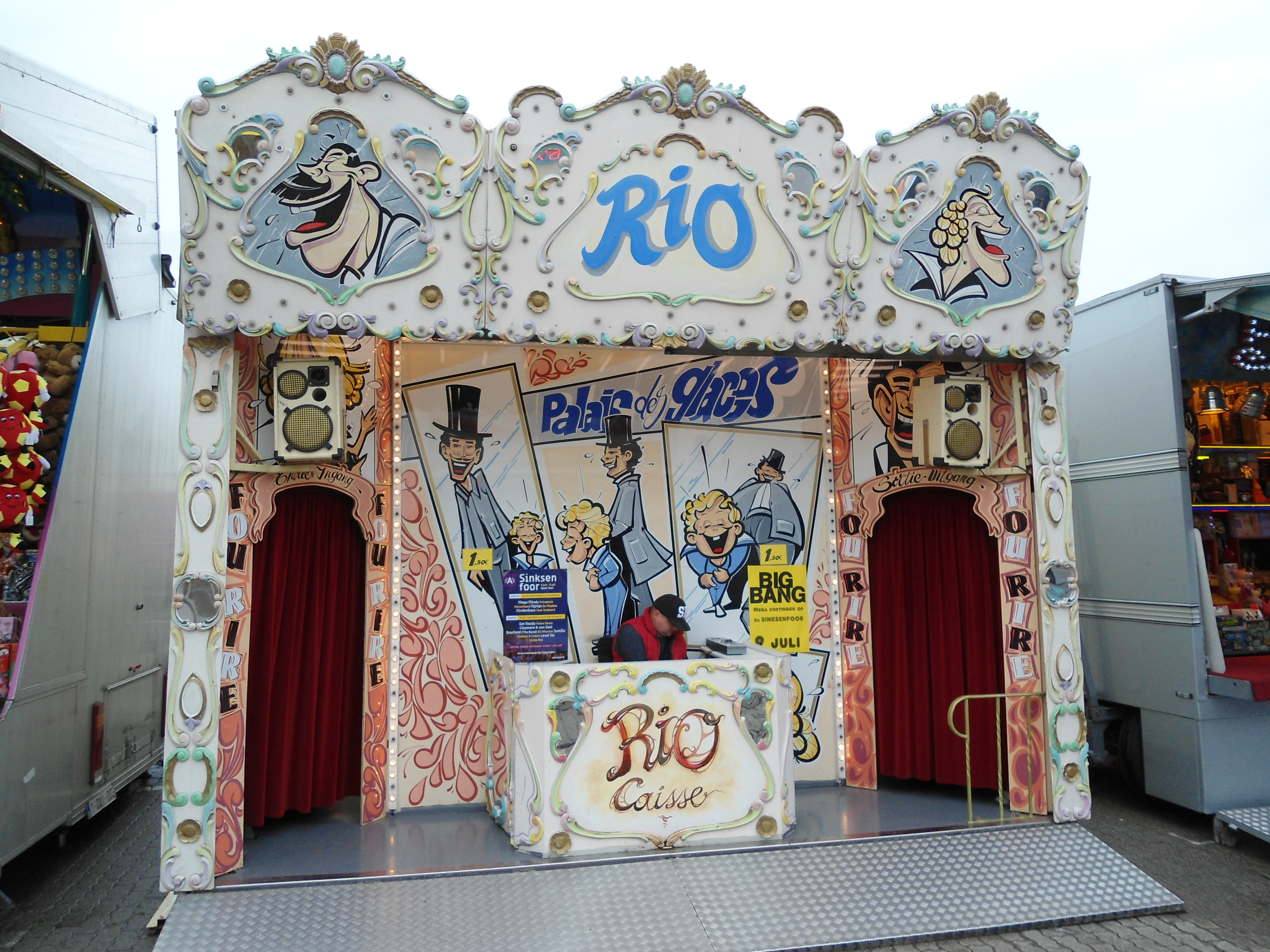 Nostalgische lachspiegeltent op de kermis te Antwerpen